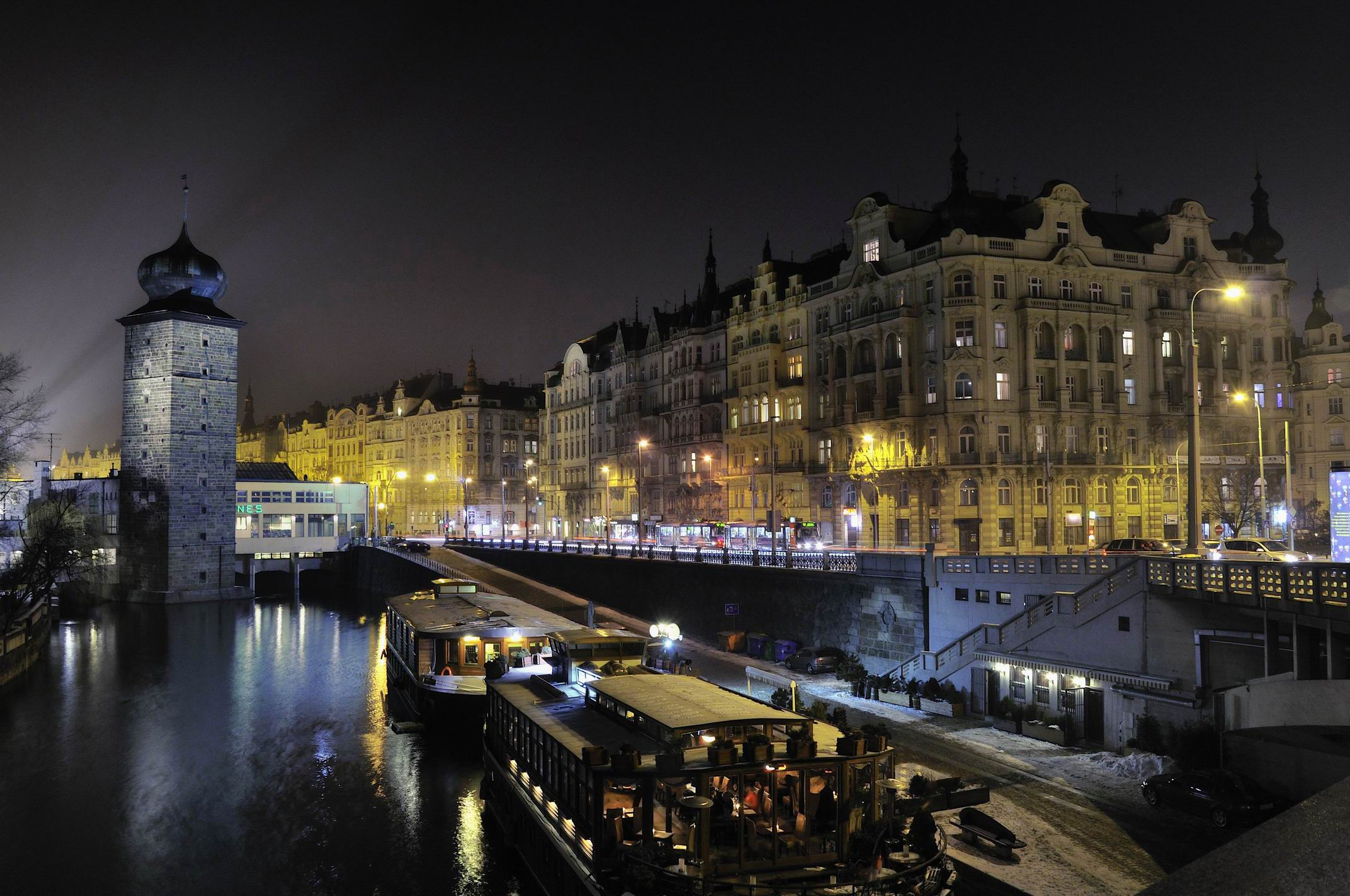 Činžovní dům (Nové Město), Praha 2, Masarykovo nábř. 2014/2, Nové Město